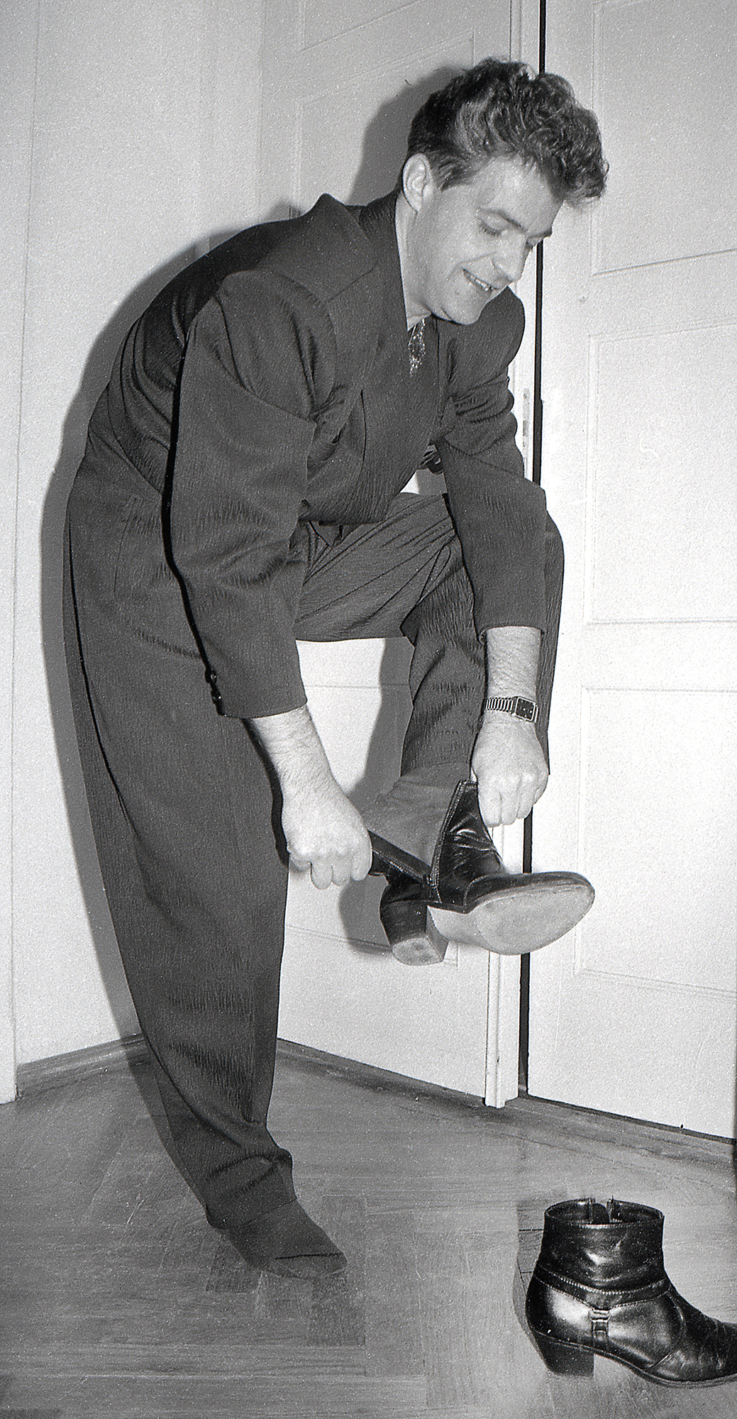 Tõnu Kilgas